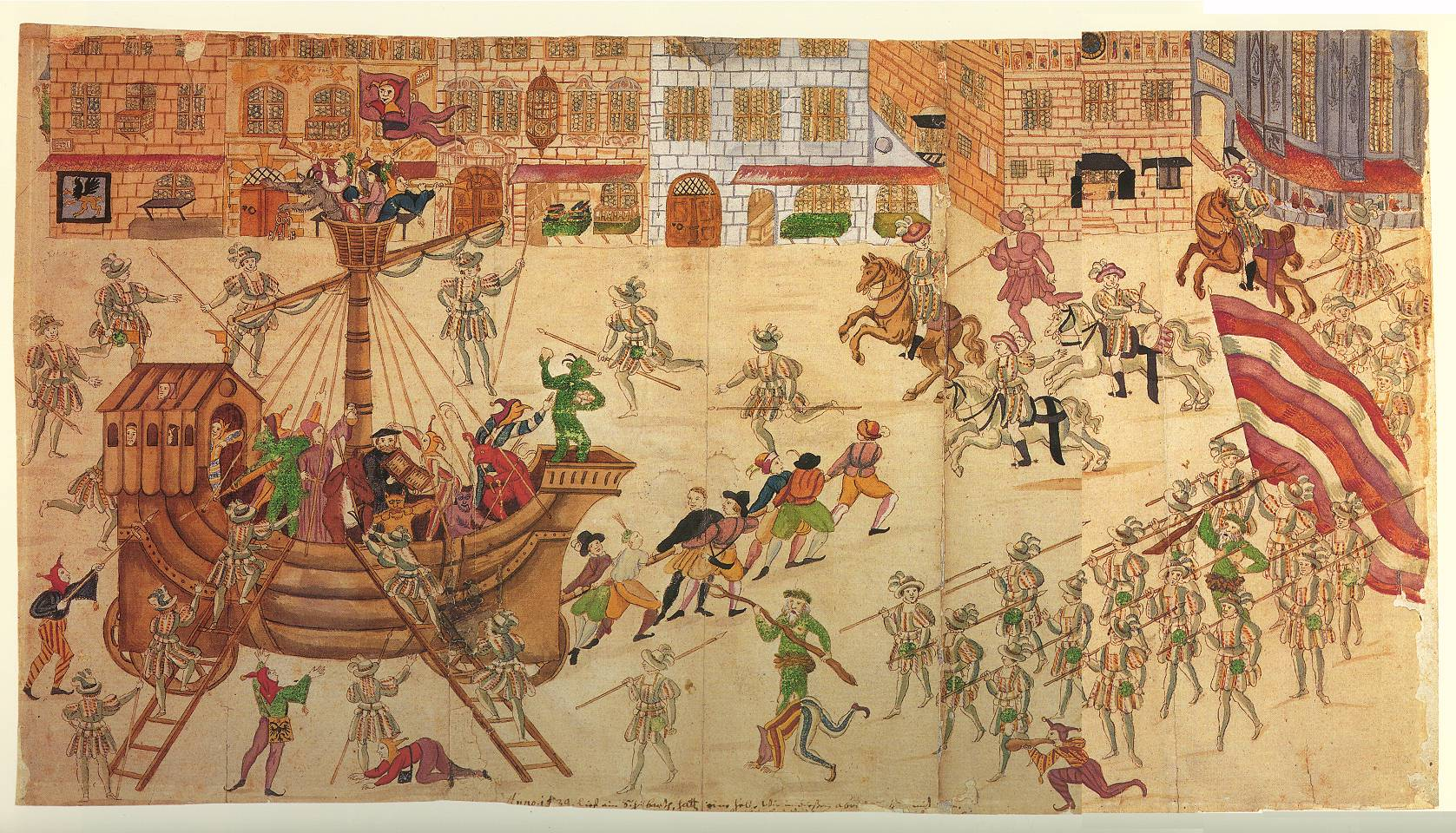 Schembartlauf in Nuremberg